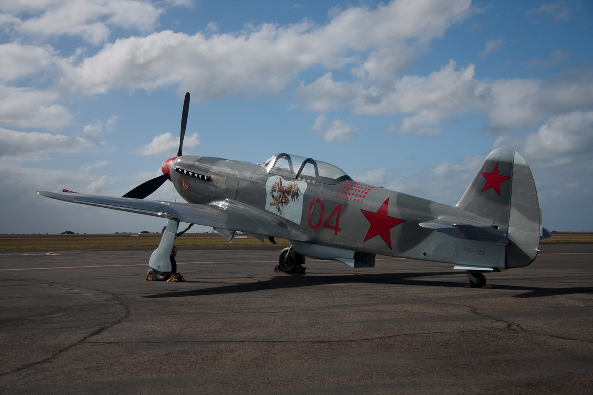 Yakovlev Yak-9UM